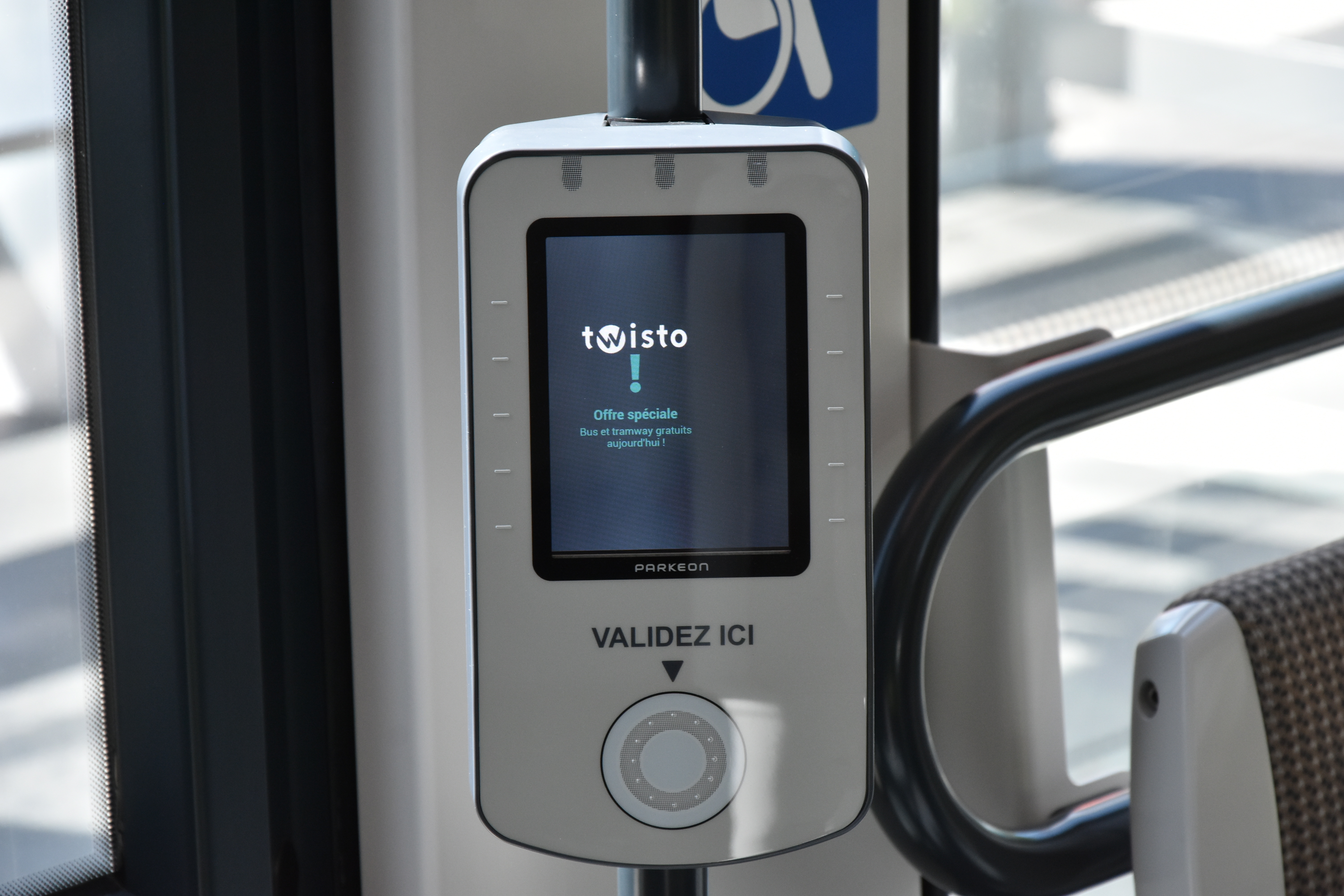 validateur twisto dans une rame de tramway